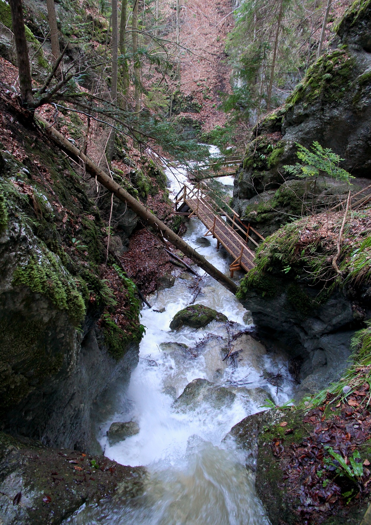 Die Steinwandklamm kurz vor dem Einstieg zum Rudolf-Decker-Steig.